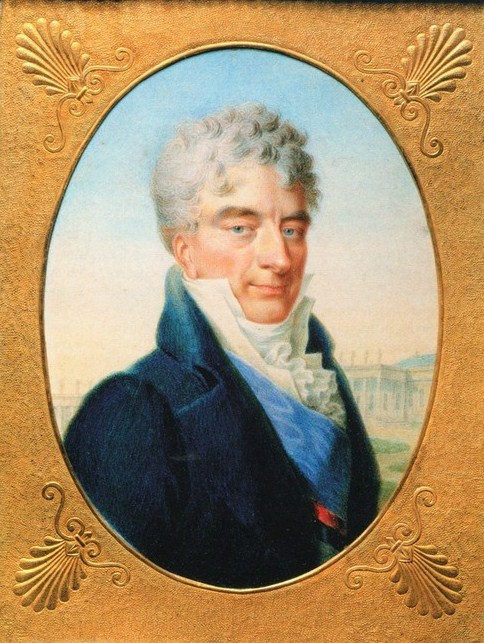 Андрей Кириллович Разумовский (1752—1836).